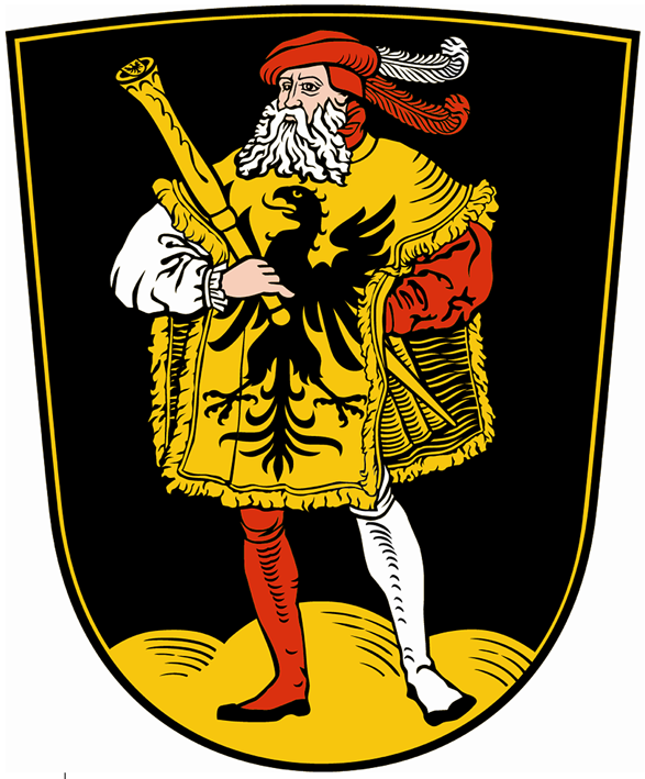 Wappen des Vereins HEROLD e.V.